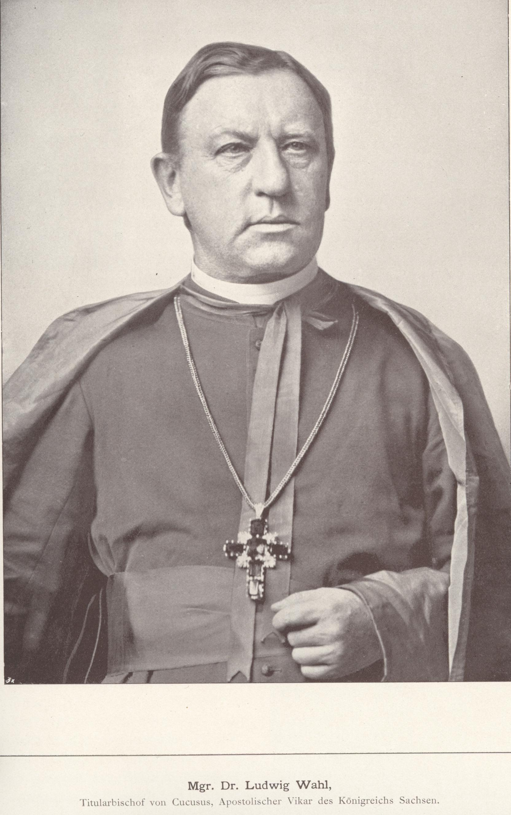 Msgr. Ludwig Wahl, Apostolischer Vikar von Sachsen